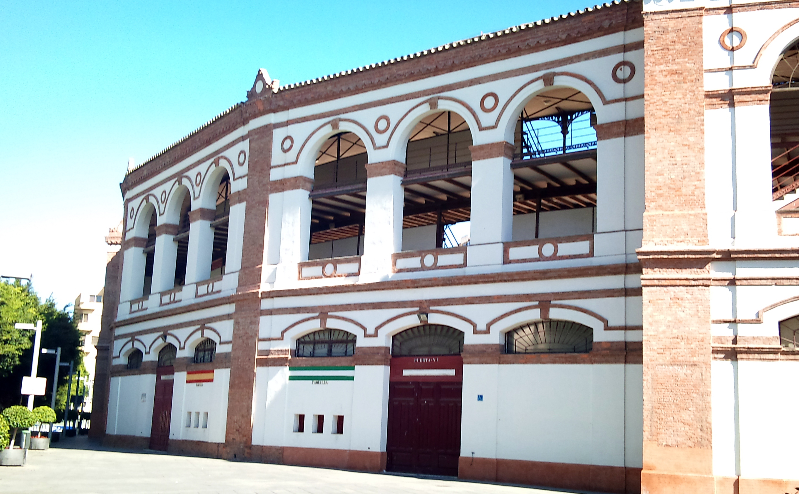 Plaza de Toros de Málaga, La Malagueta. Este de Málaga junto al paseo Reding.